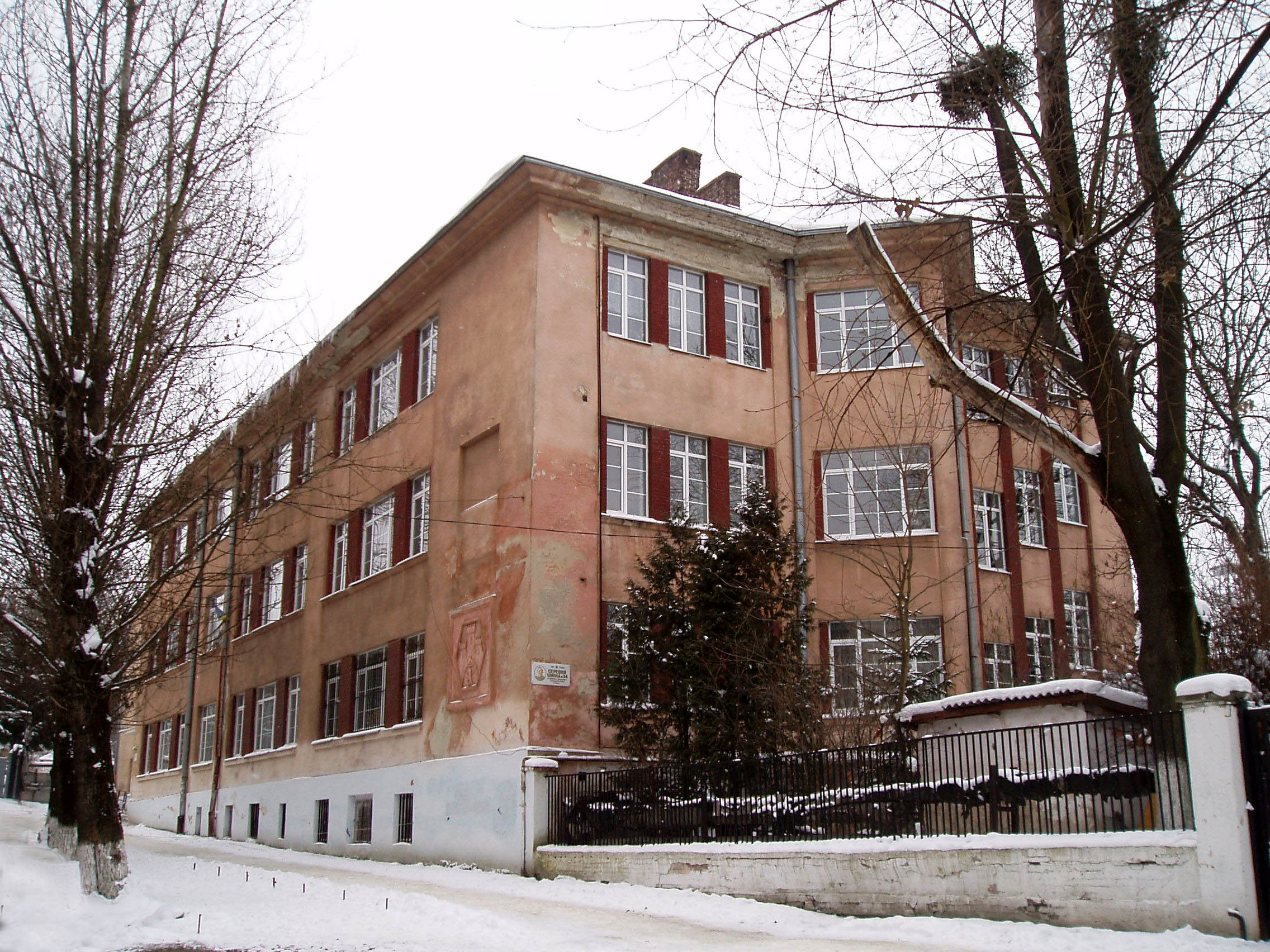 Школа № 34 у Львові на вулиці Замкненій, 8. Збудована у 1930-1932 роках за проектом Тадеуша Обмінського (1874—1932).